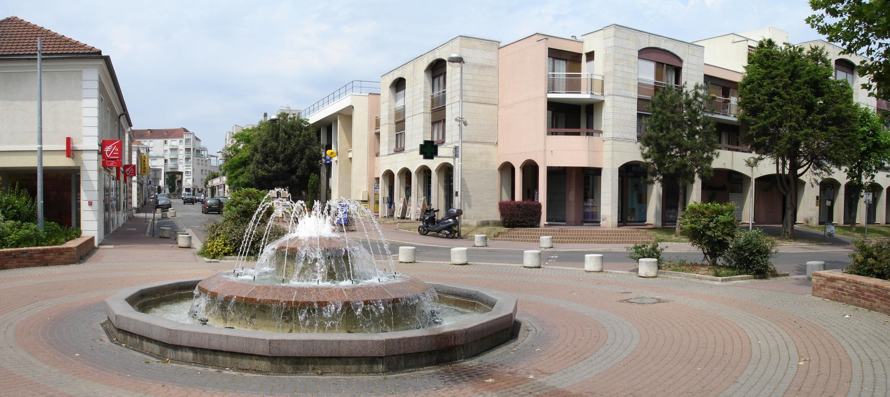 Avenue de l'Europe - Eaubonne (France)